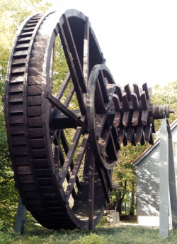 The original description page was here. All following user names refer to de.wikipedia. Beschreibung:Rekonstruktion eines Kehrrades in Clausthal-Zellerfeld (Gelände der Harzwasserwerke)